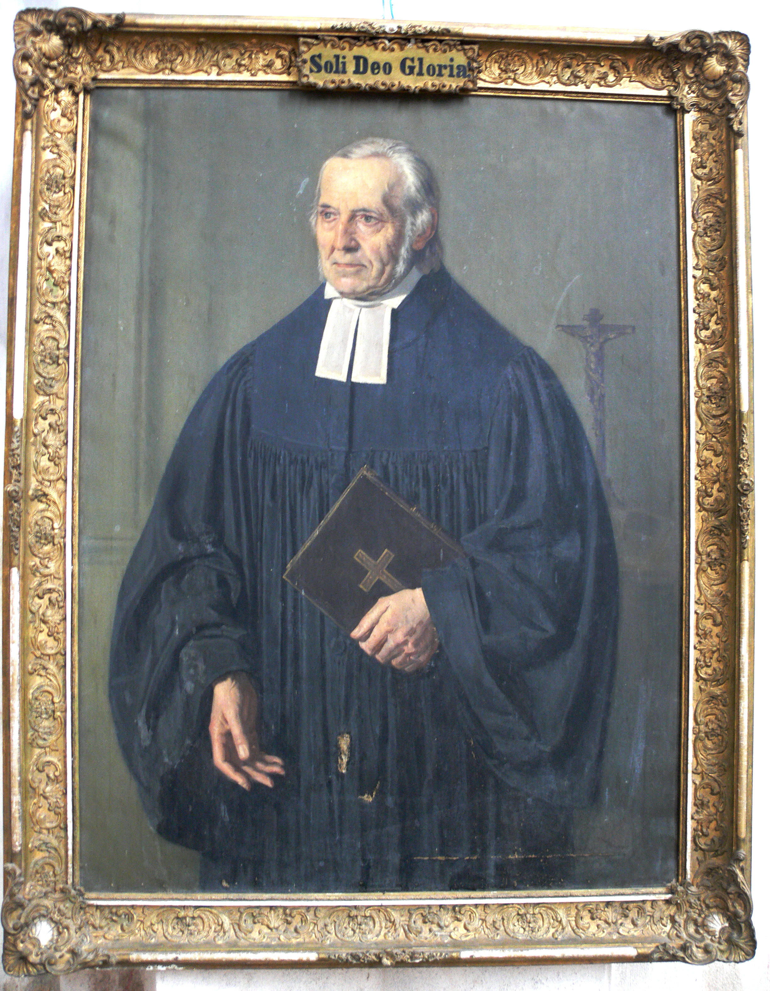 Luckau, Landkreis Dahme-Spreewald, Brandenburg St.-Nikolai-Kirche Porträt des Superintendenten Karl Heinz Krahne (1779-1864), gemalt von Adolf Werner (1827-1904), 1861